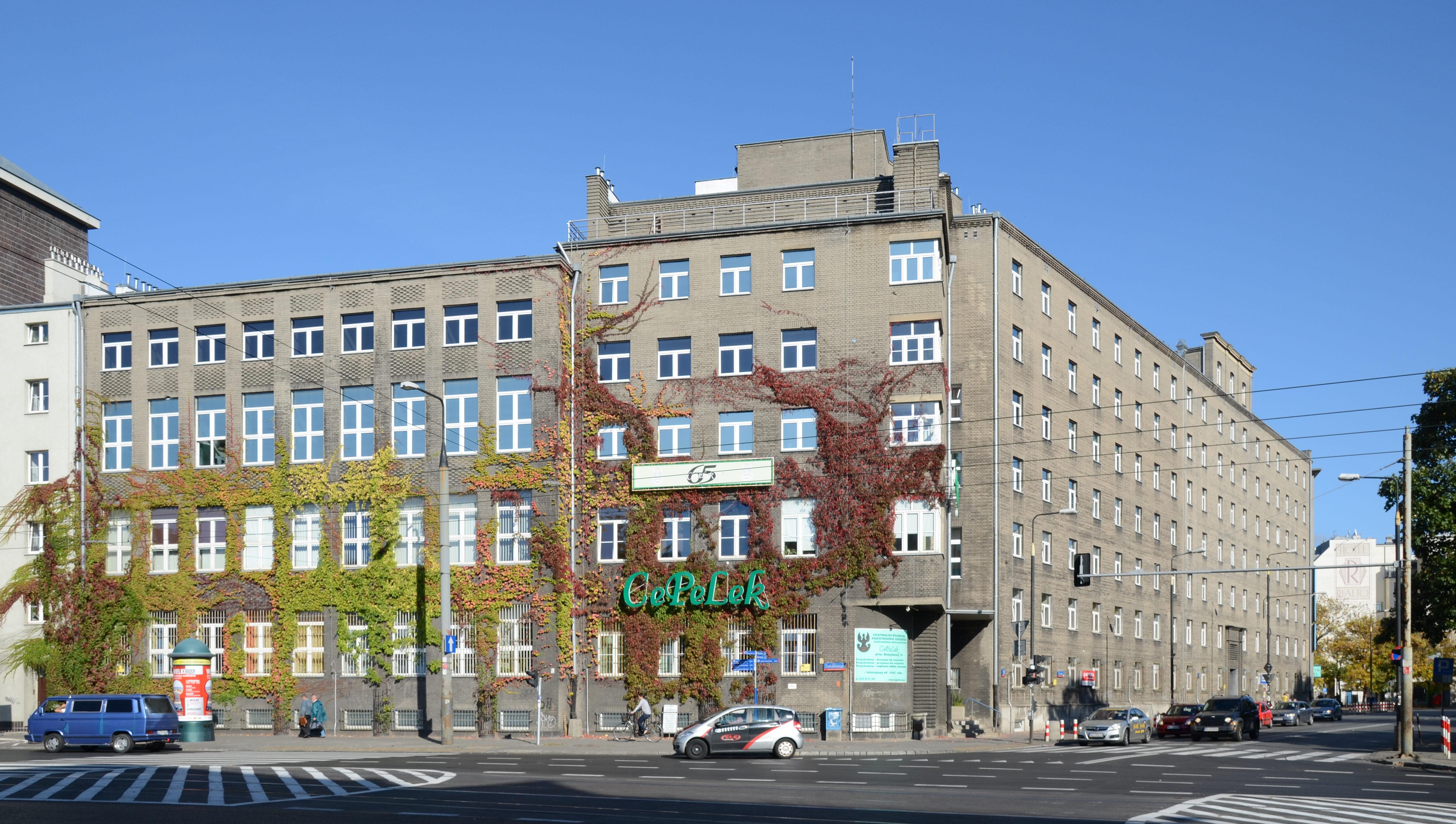 Przychodnia Cepelek na skrzyżowaniu ulic Chałubińskiego i Koszykowej.